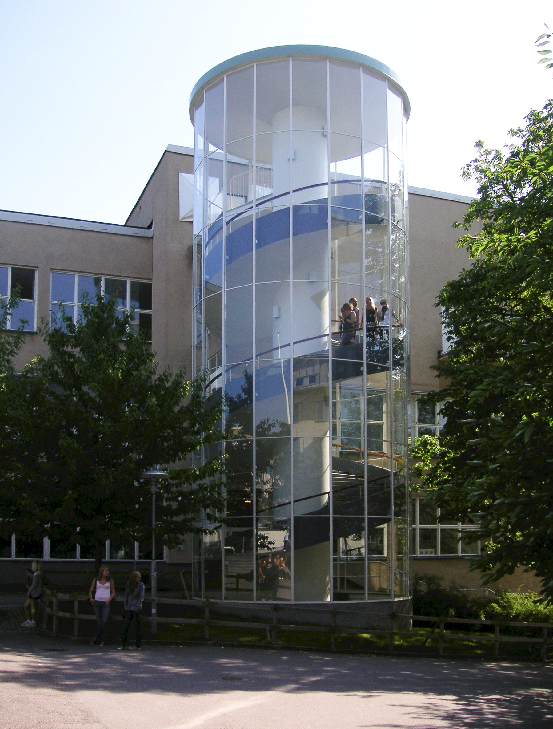 Polhemsgymnasiet i Stockholm, huvudtrappa, arkitekt Paul Hedqvist